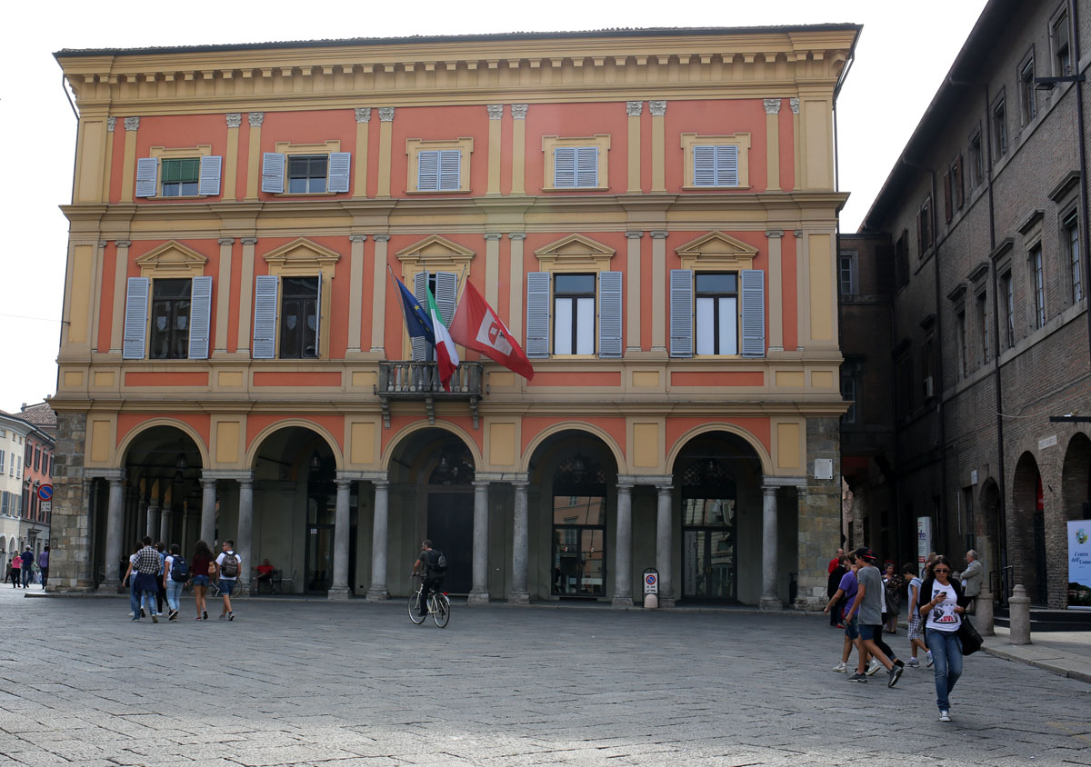 Palazzo dei Mercanti This is a photo of a monument which is part of cultural heritage of Italy.